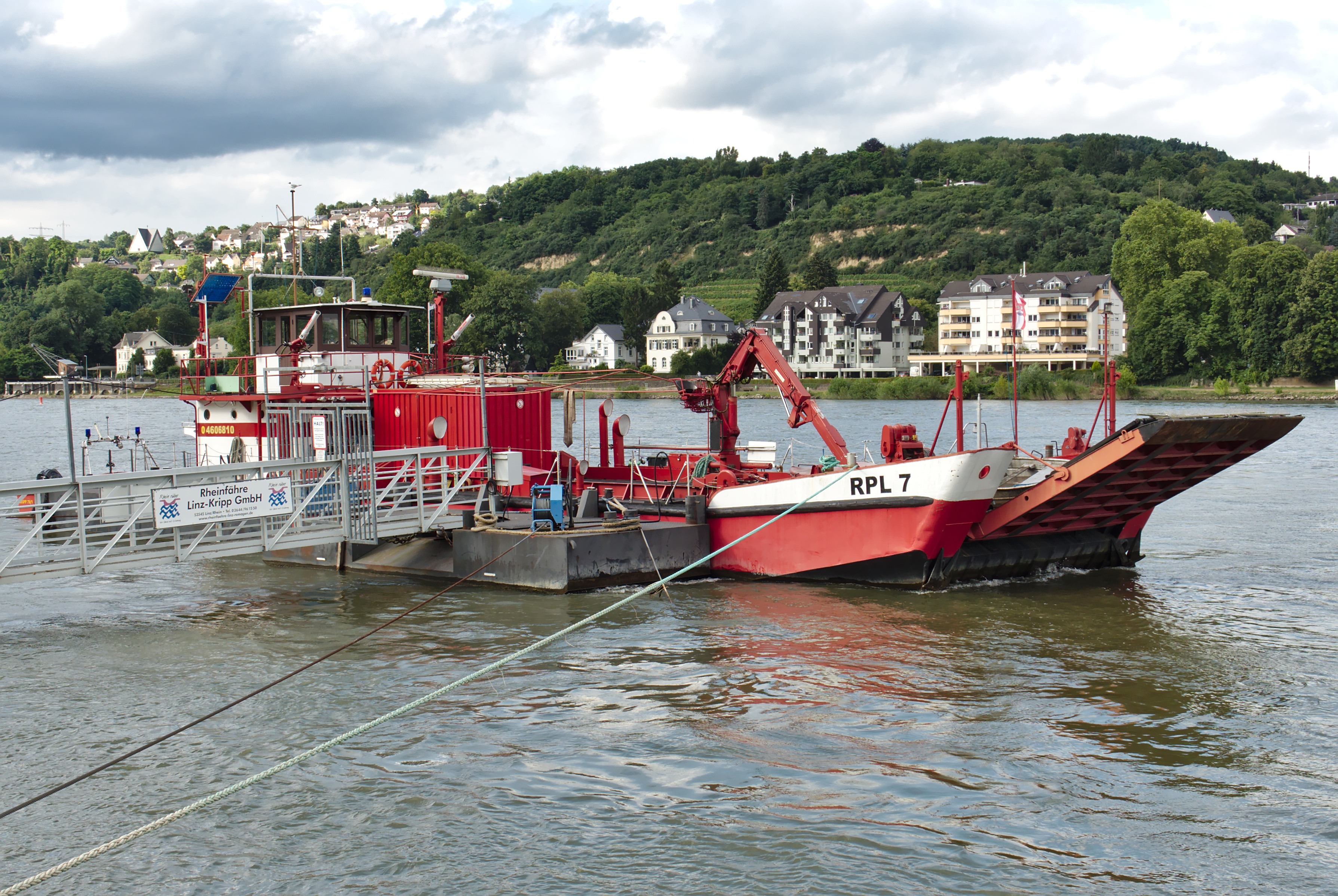 Feuerwehrmehrzweckfähre RPL 7 der Feuerwehr Remagen